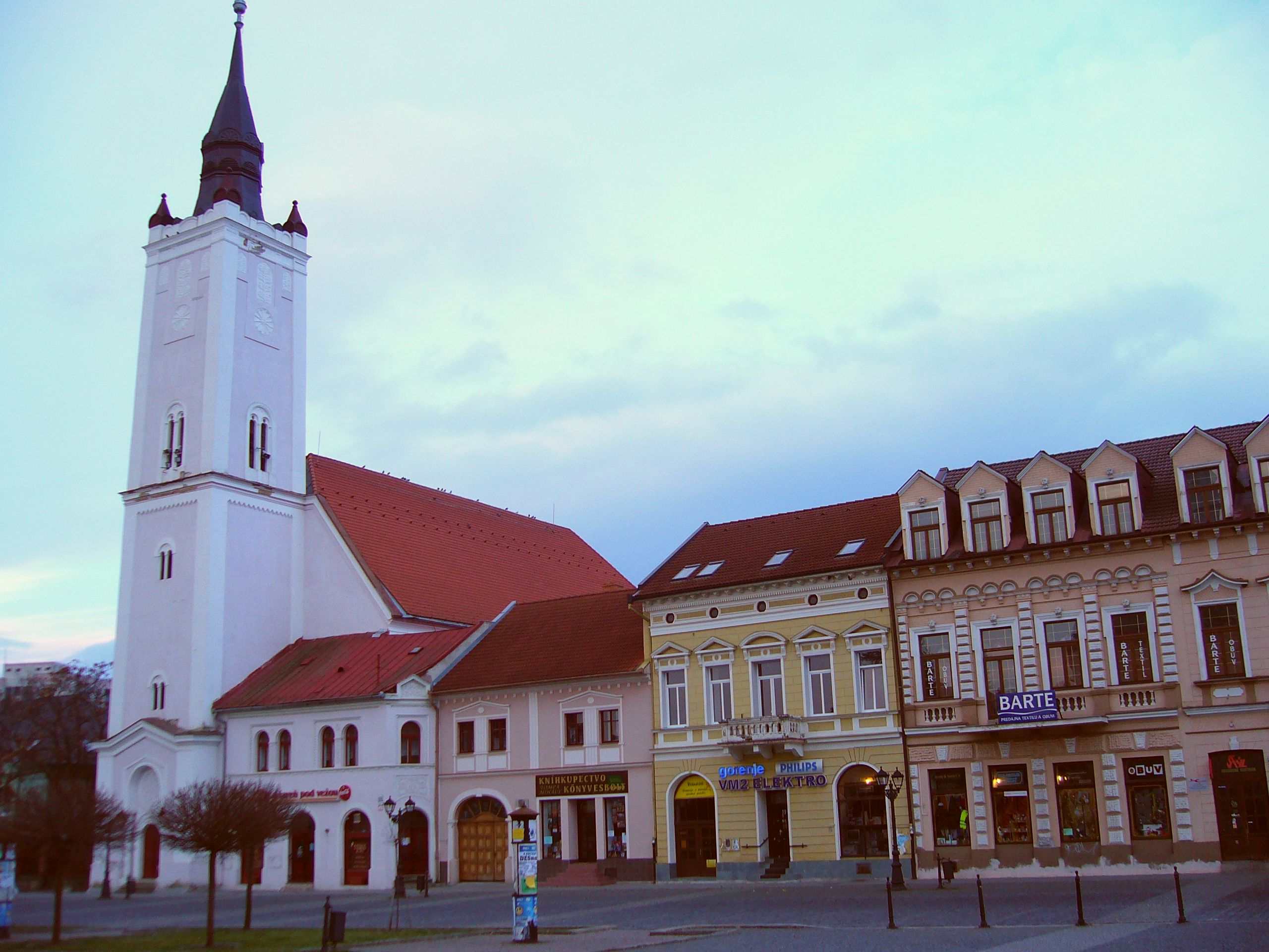 Rimaszombat, református templom